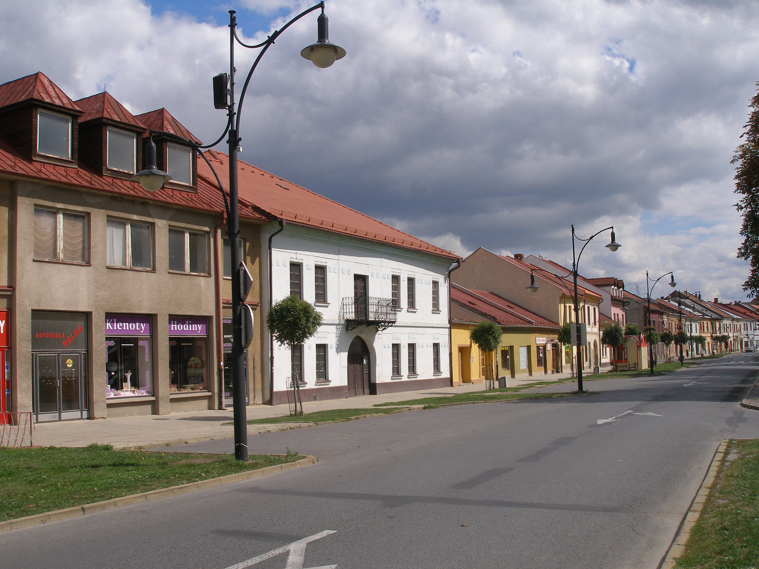 Sabinov starobylé bývalé slobodné kráľovské mesto na Slovensku. Dnes okresné mesto v regióne Šariš.